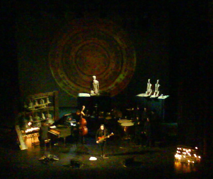 Rosa Crux am WGT 07 in Leipzig